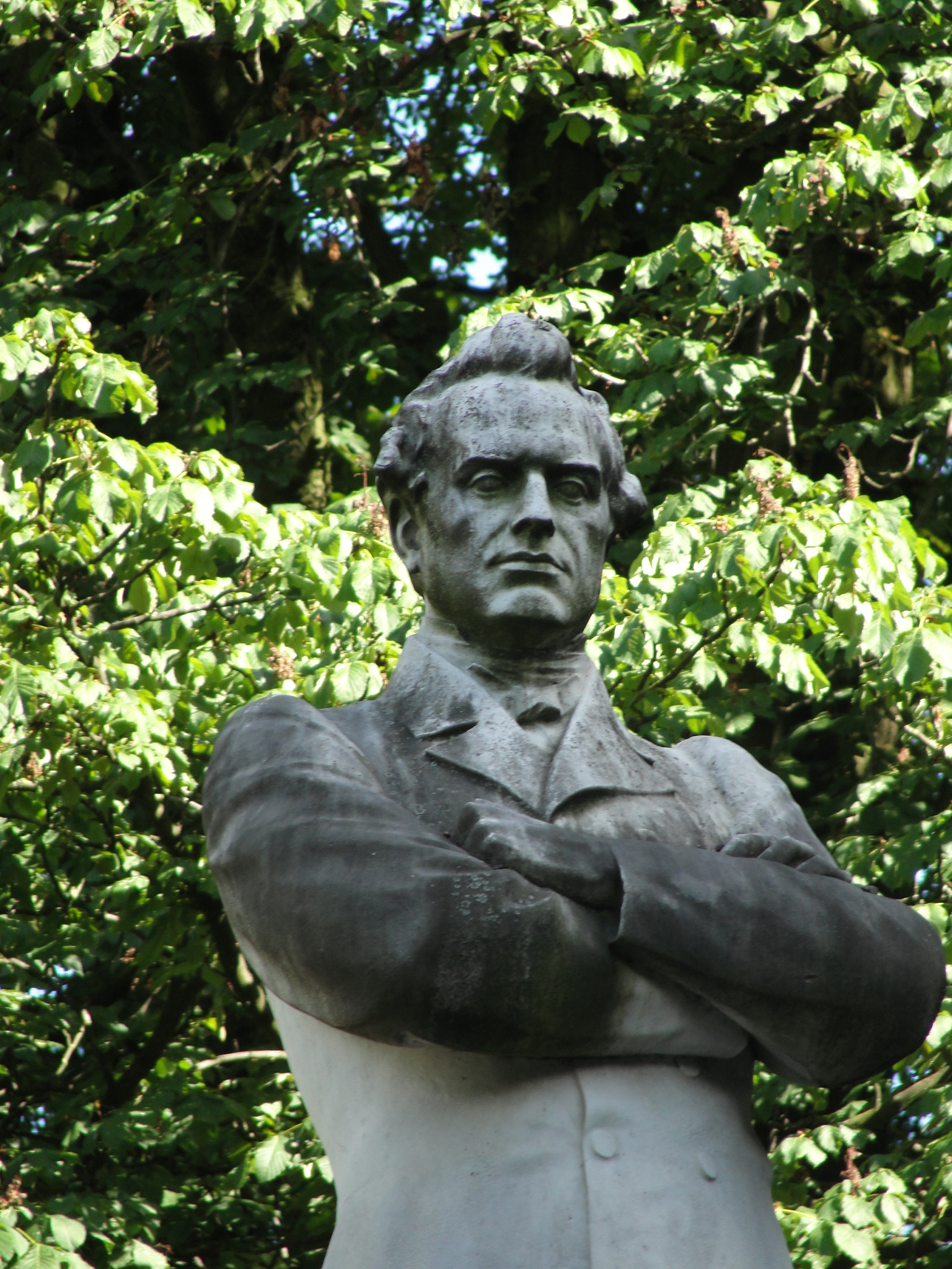 Standbeeld van Walthère Frère-Orban, door beeldhouwer Charles Samuel, onthuld in 1900. Frère-Orbansquare, Leopoldwijk, Brussel.